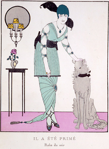 Fashion plate fomr La Gazette du Bon Ton, "Il a Eté Primé" robe de soie (silk gown) with hobble skirt